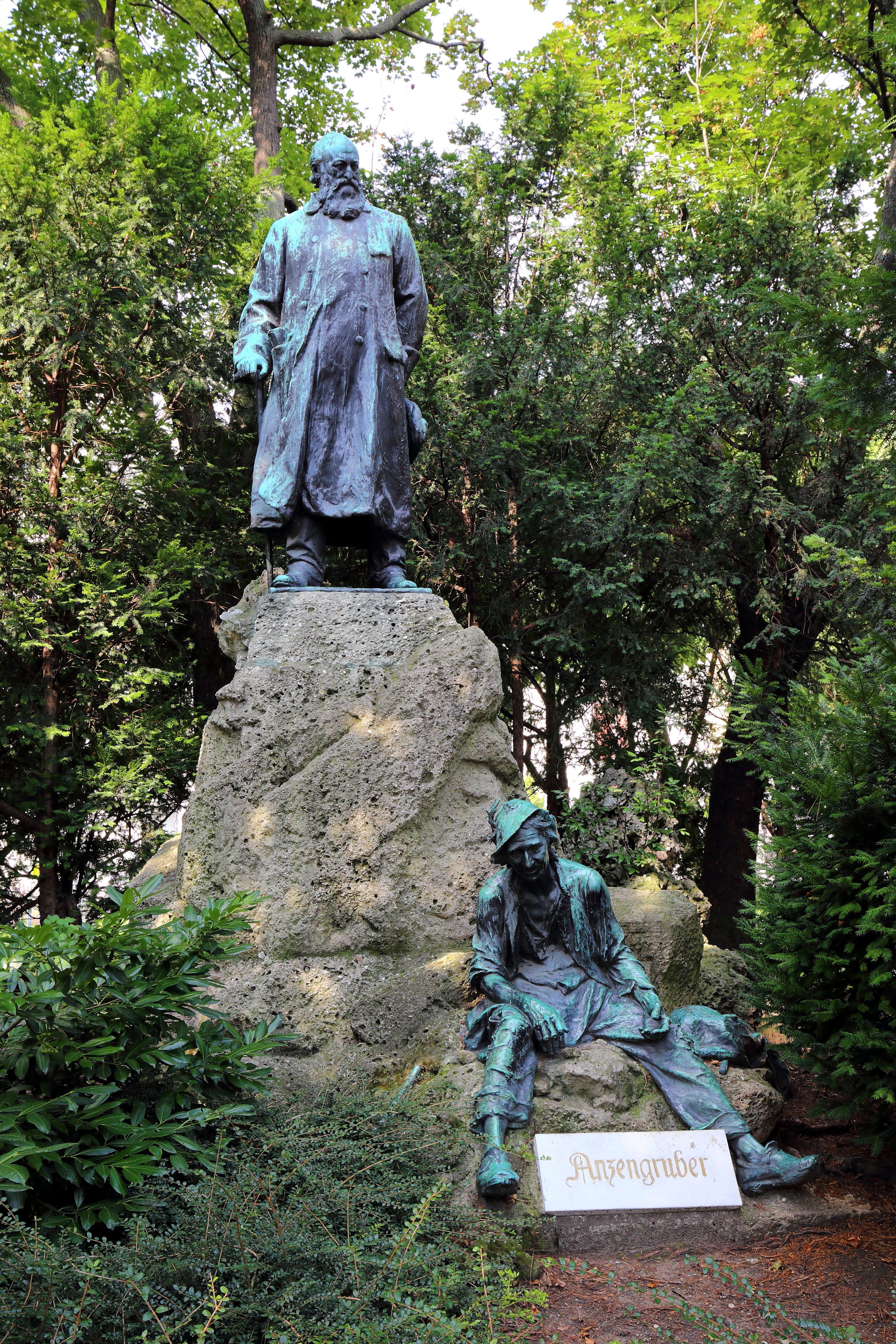 Das Anzengruber-Denkmal im nordwestlichen Bereich des Schmerlingplatzes in der österreichischen Bundeshauptstadt Wien. Das Denkmal zur Ehre des österreichischen Schriftstellers Ludwig Anzengruber wurde von Johann (Hans) Scherpe geschaffen und am 30.4.1905 enthüllt. Die Figur unterhalb Anzengrubers Bronzestatue stellt den Steinklopferhannes dar, eine von Anzengruber erfundene Figur.